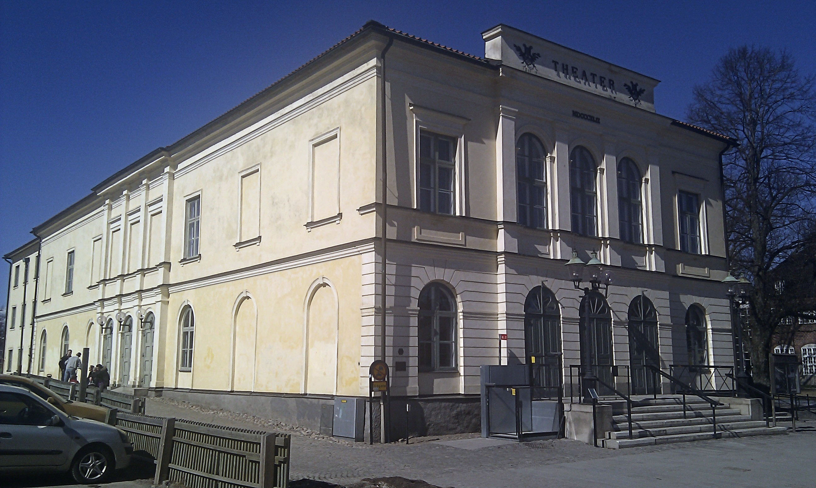 Växjö gamla teater sedd från sidan